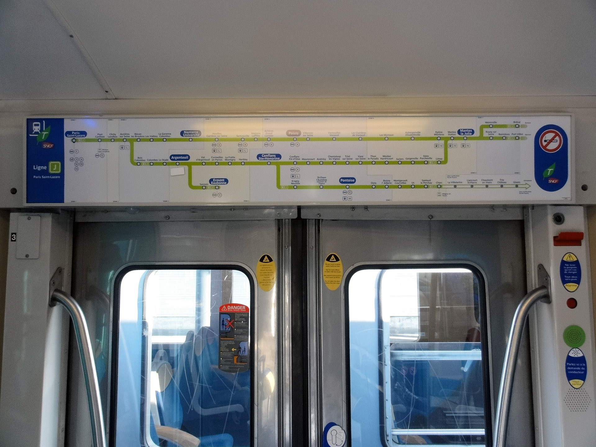 Plan de la ligne J du Transilien à l'ntérieur d'une rame inox de banlieue.